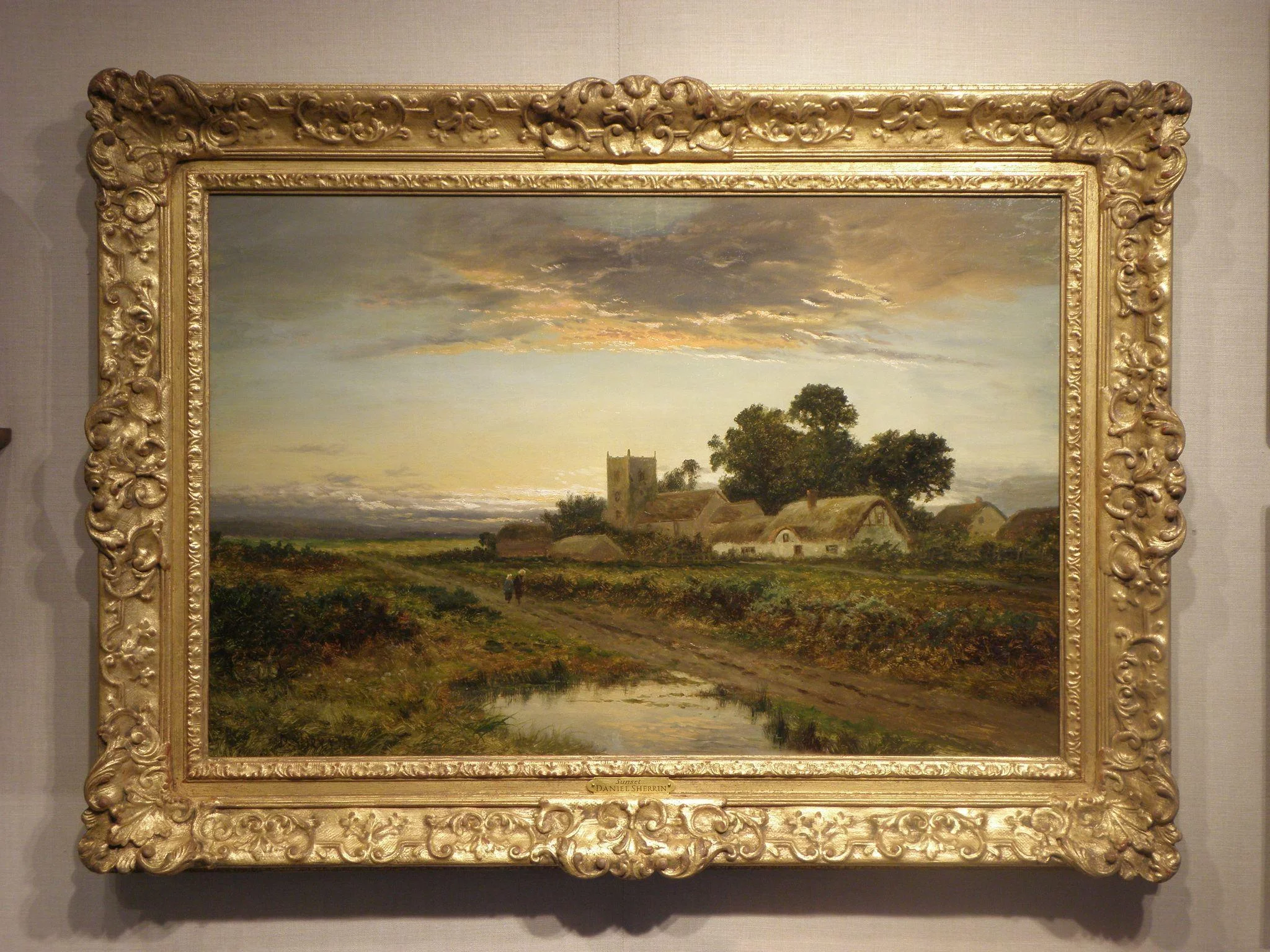 Slatiny v Suffolku